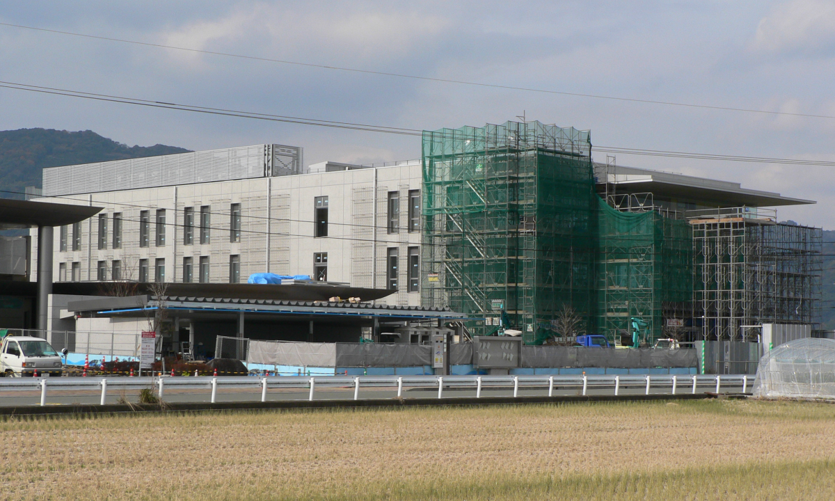 西部市民センター敷地内に建設中の熊本市西区役所